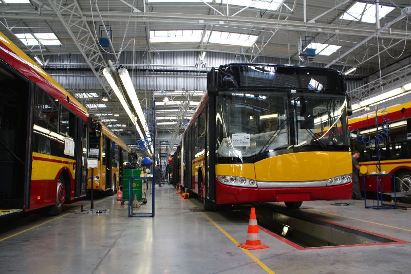 Bolechowo